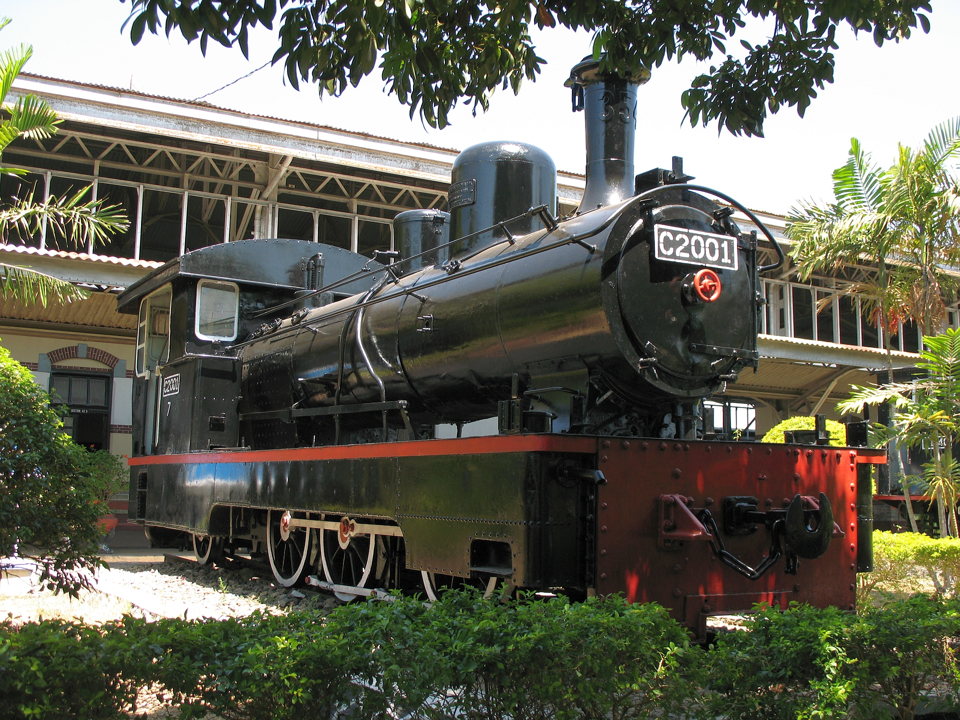 DKA C20 (C 20 01 A)